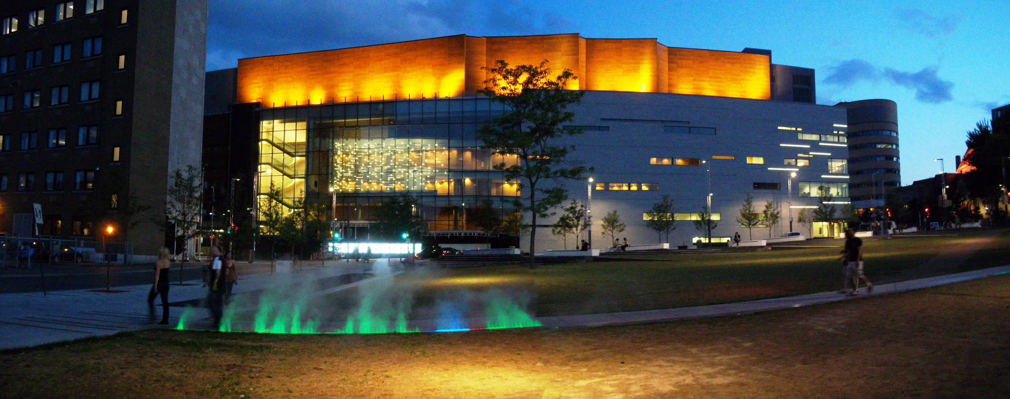 Maison symphonique de Montréal vue de l'Est